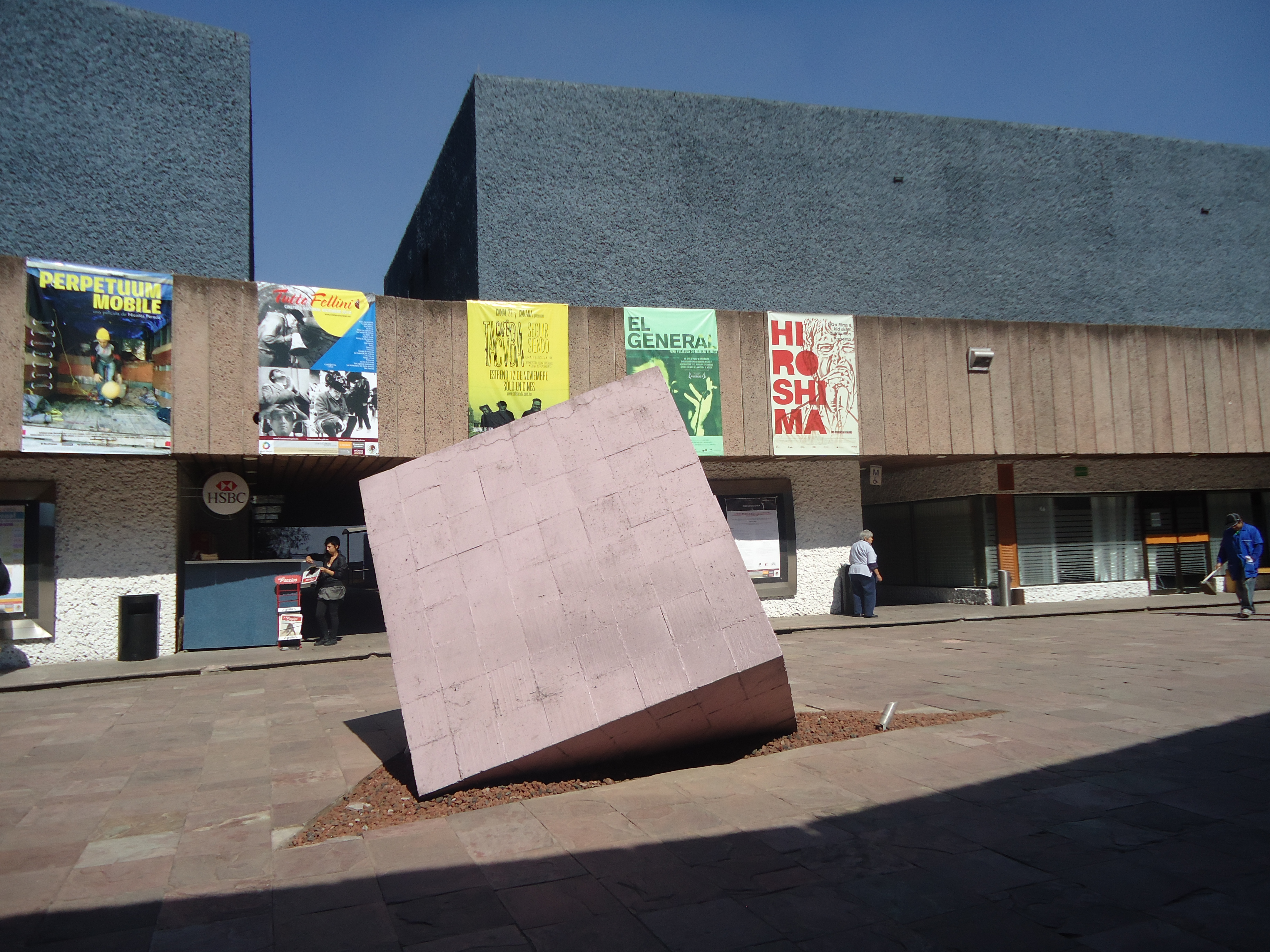 Cineteca Nacional, Mexico-City. entrance